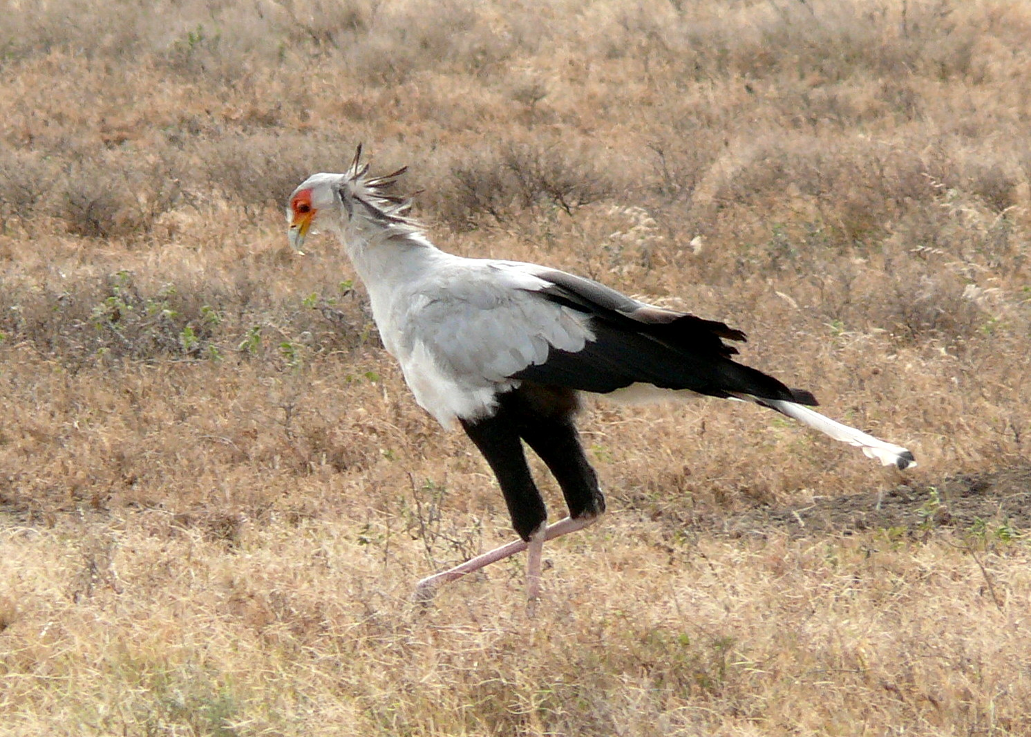 Sekretär (Sagittarius serpentarius)